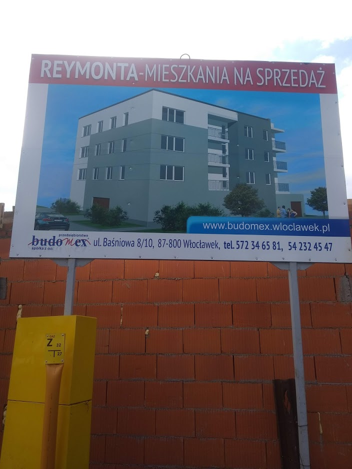 Budowa bloku przy Reymonta 17B (2020 r.)